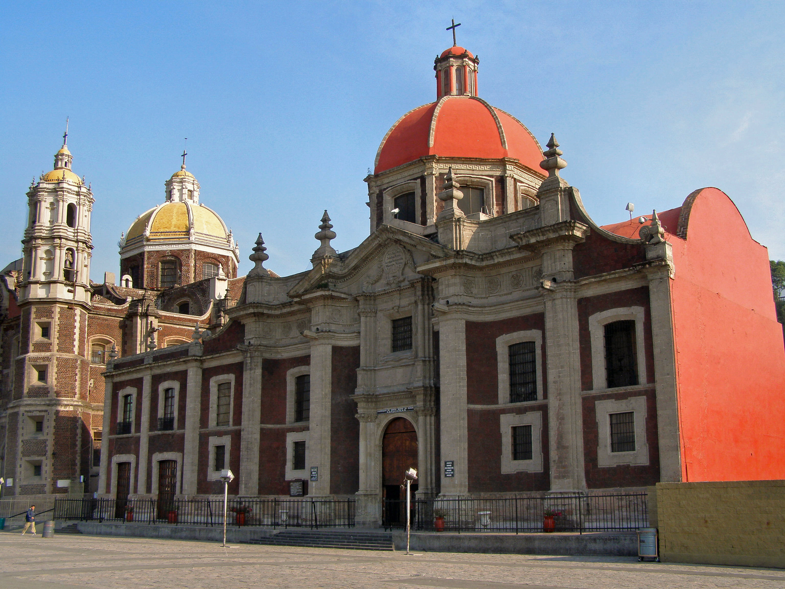 Eglise et couvent des Capucins - Sanctuaire Notre-Dame de Guadalupe - Mexico-City (Mexique)